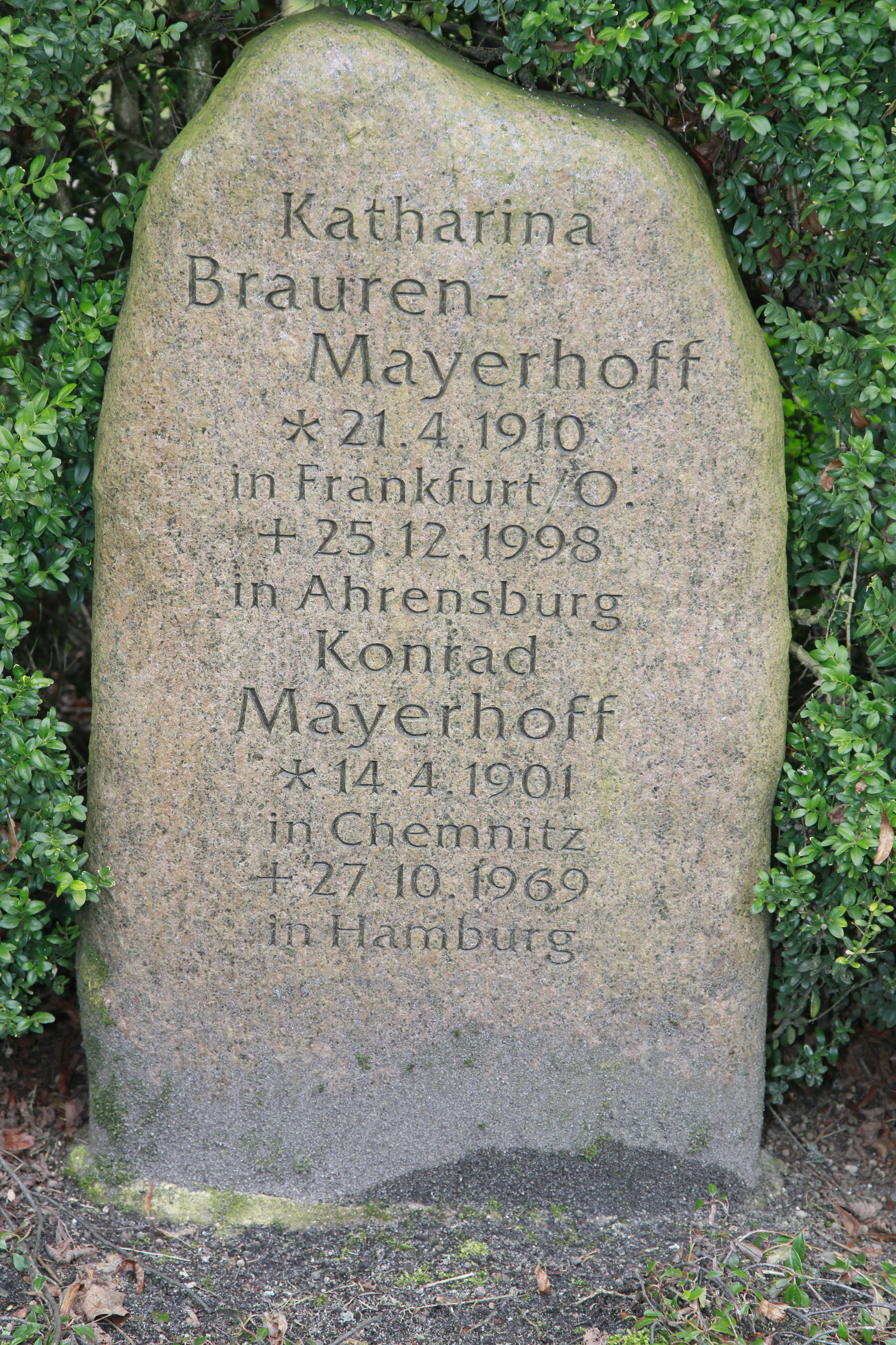 Katharina Brauren (* 21. April 1910 in Grabow; † 25. Dezember 1998 in Ahrensburg) war eine deutsche Schauspielerin und Synchronsprecherin.